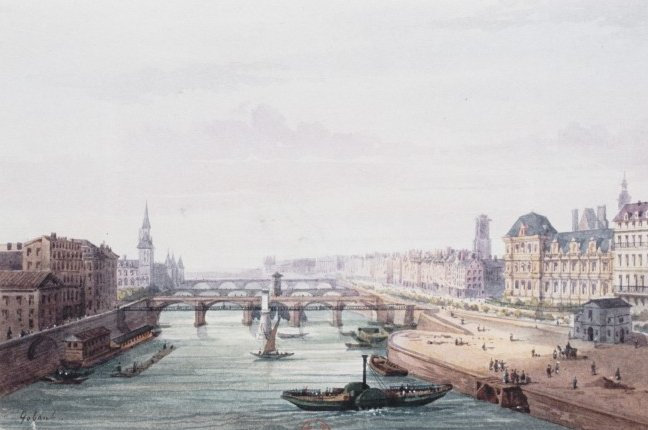 Paris - Pont d'Arcole, par Gaspard Gobaut (1814-1882). Aquarelle et rehauts de gouache 12,5 x 18,2 cm, en provenance de la collection Hippolyte Destailleur.